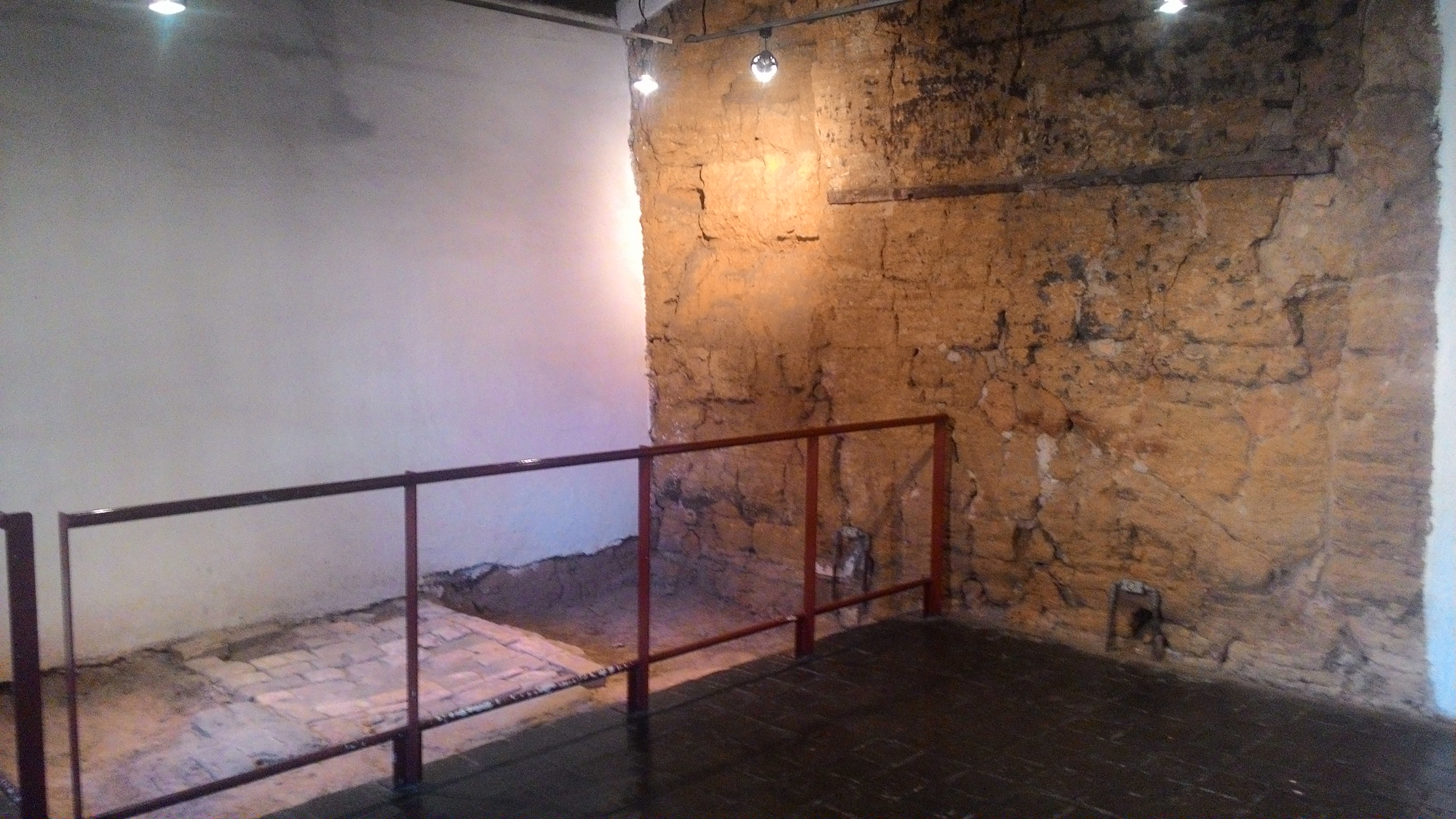 Cômodo da Casa do Sítio Tatuapé, em São Paulo (SP), Brasil.